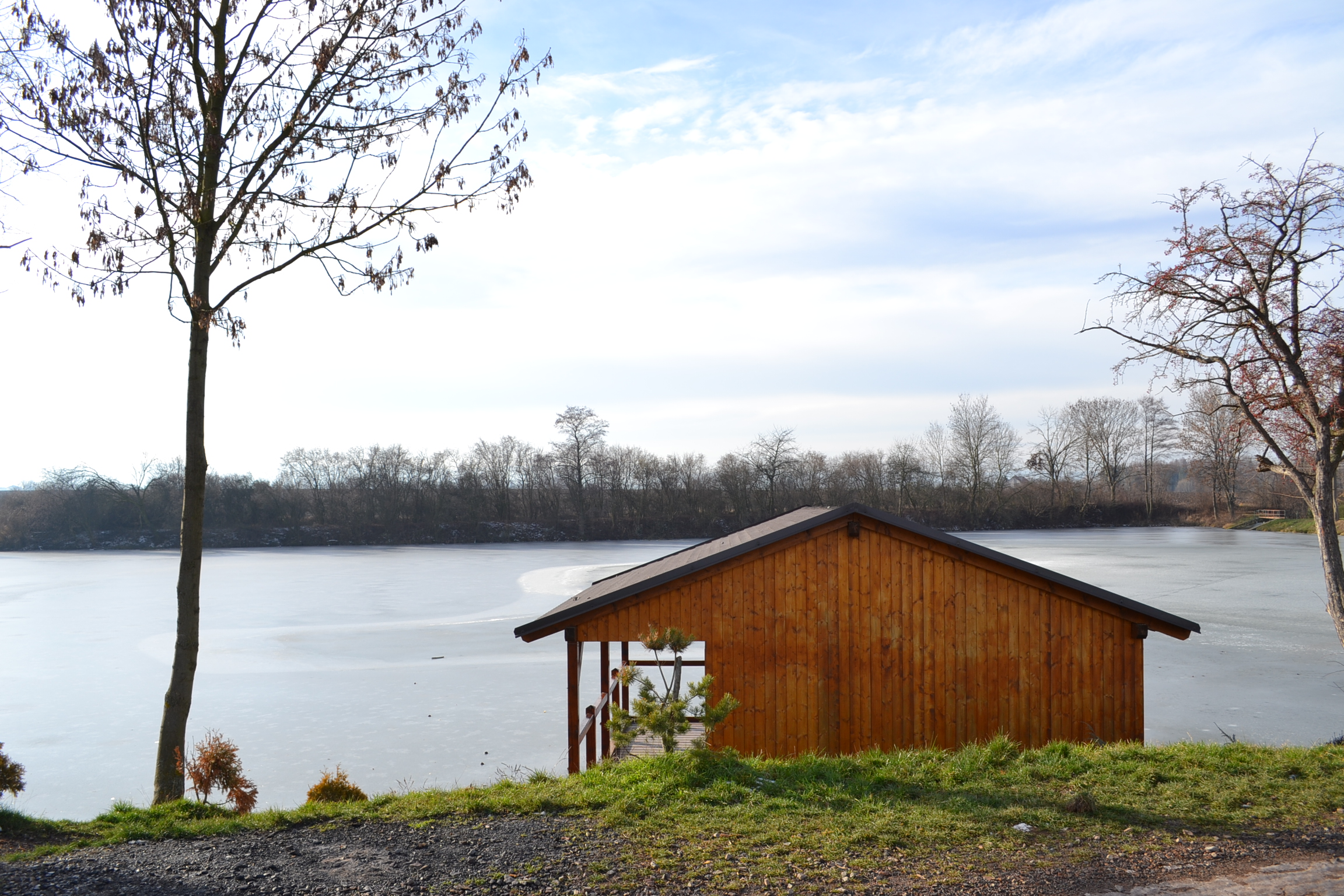 Pohled z cesty